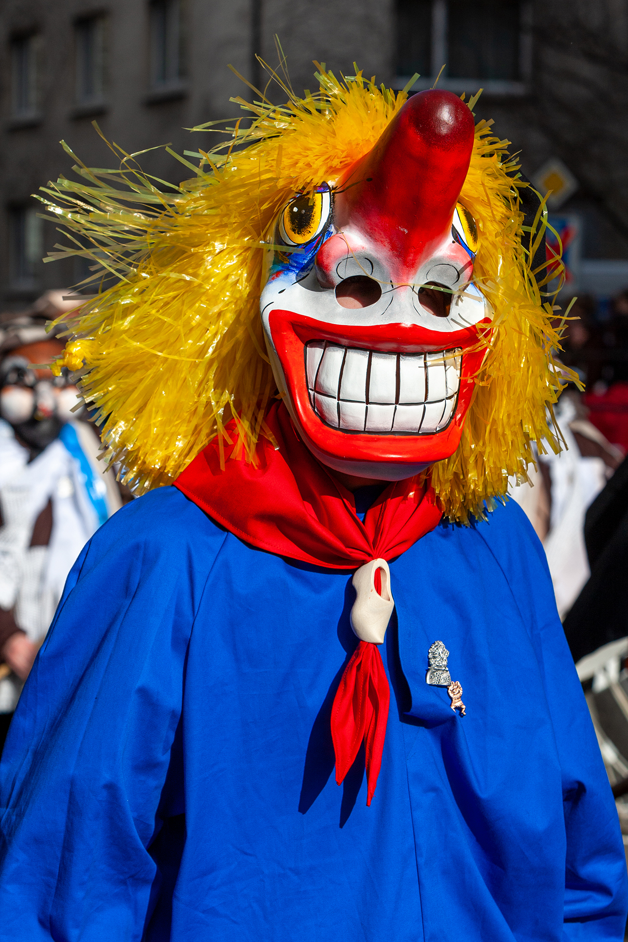 Eine typische Figur der Basler Fasnacht ist der Waggis.